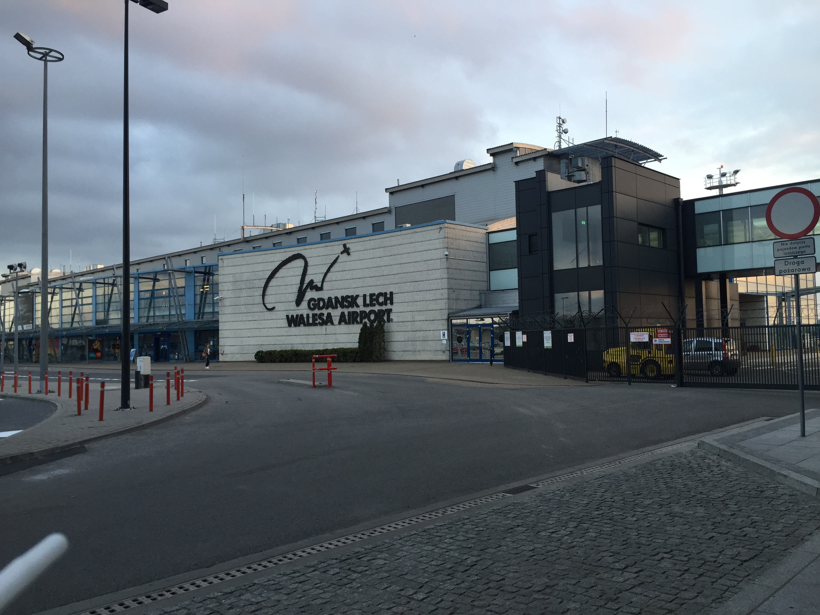 Gdańsk Lech Wałęsa Airport This photo was taken during Railway Wikiexpedition 2015 set up by Wikimedia Polska Association in cooperation with Fundacja Grupy PKP.You can see all photographs in category Wikiekspedycja kolejowa 2015.